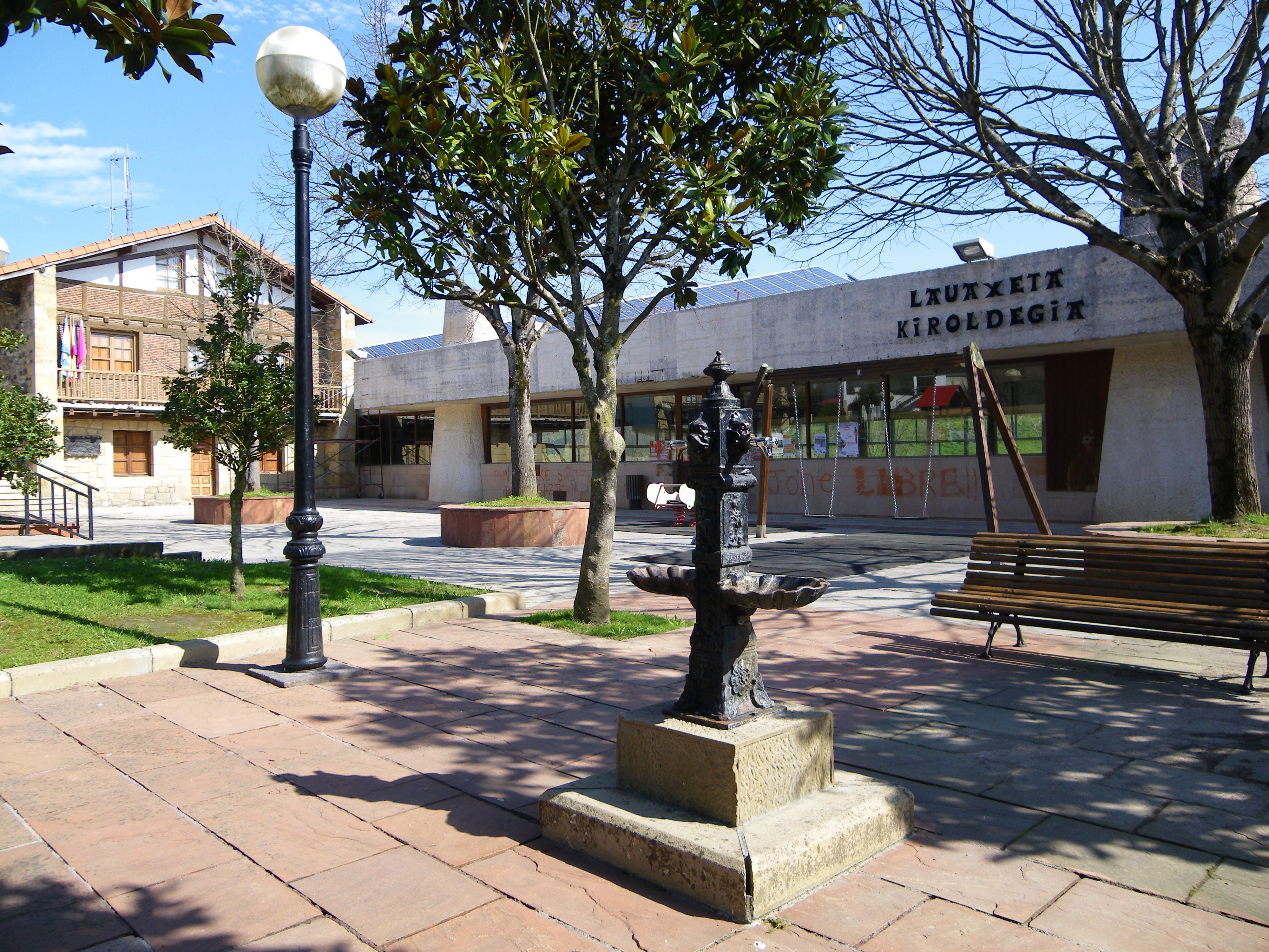 Lauaxeta plaza, Eleizalde auzoa, Laukiz, Bizkaia, Euskal Herria.